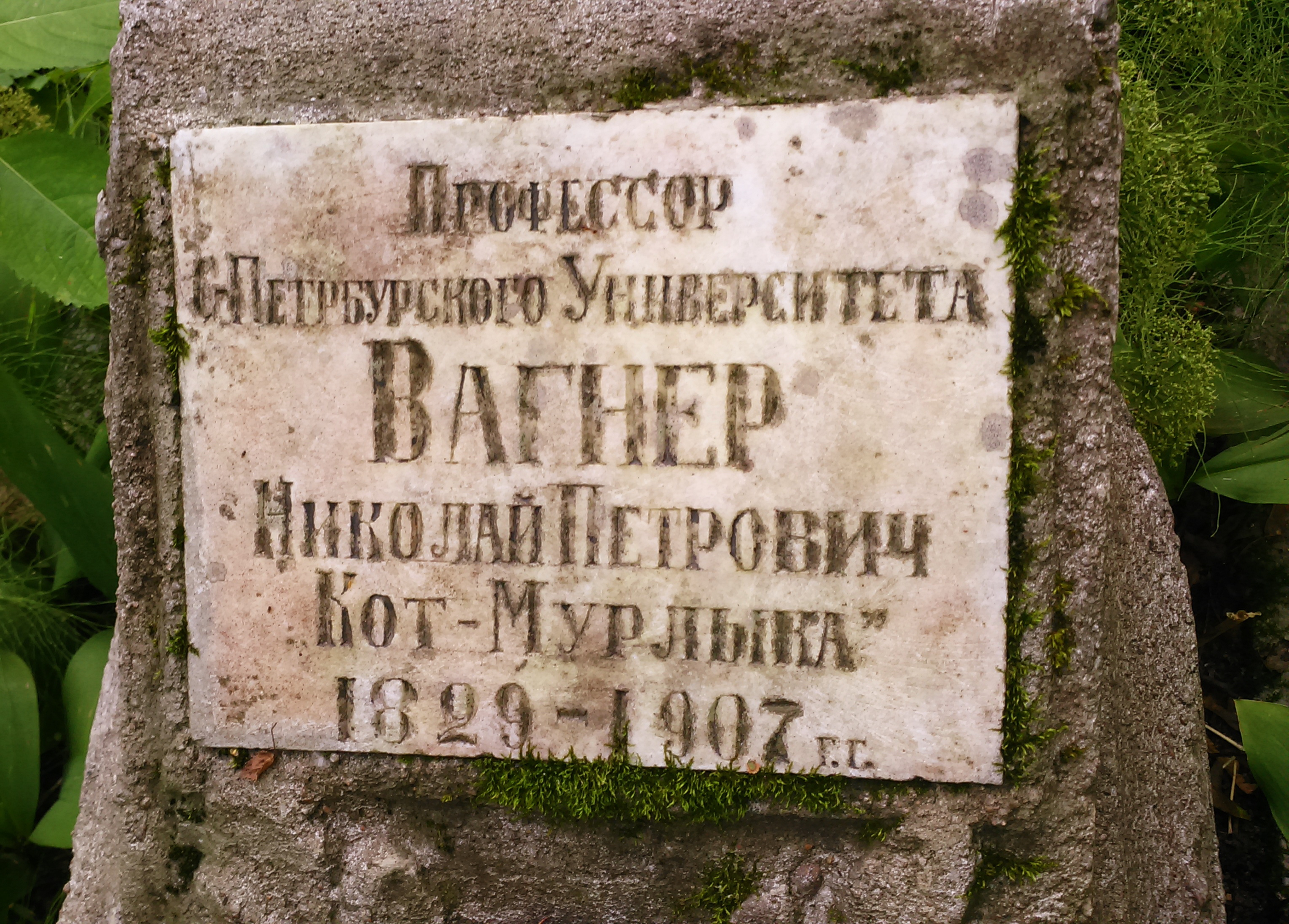 Надпись на могильном памятнике Николая Петровича Вагнера (1829-1907) на Смоленском православном кладбище в Санкт-Петербурге, Россия.